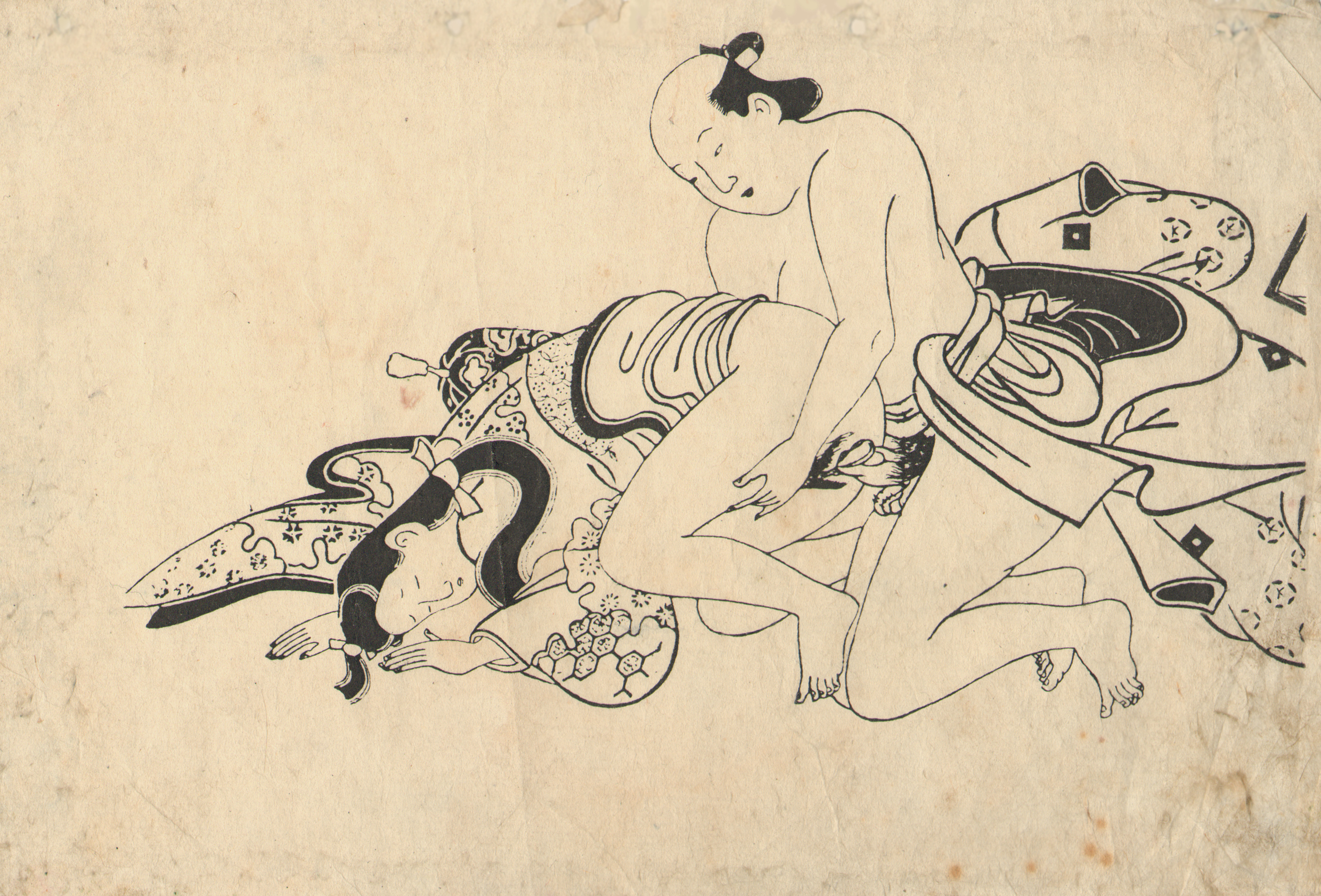 Тории Киёнобу I (1664-1729), Сюнга, 18 Х 25,5 см (лист), ксилография.